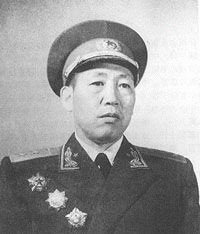 中文（中国大陆）: 王秉璋中将1955年授衔照